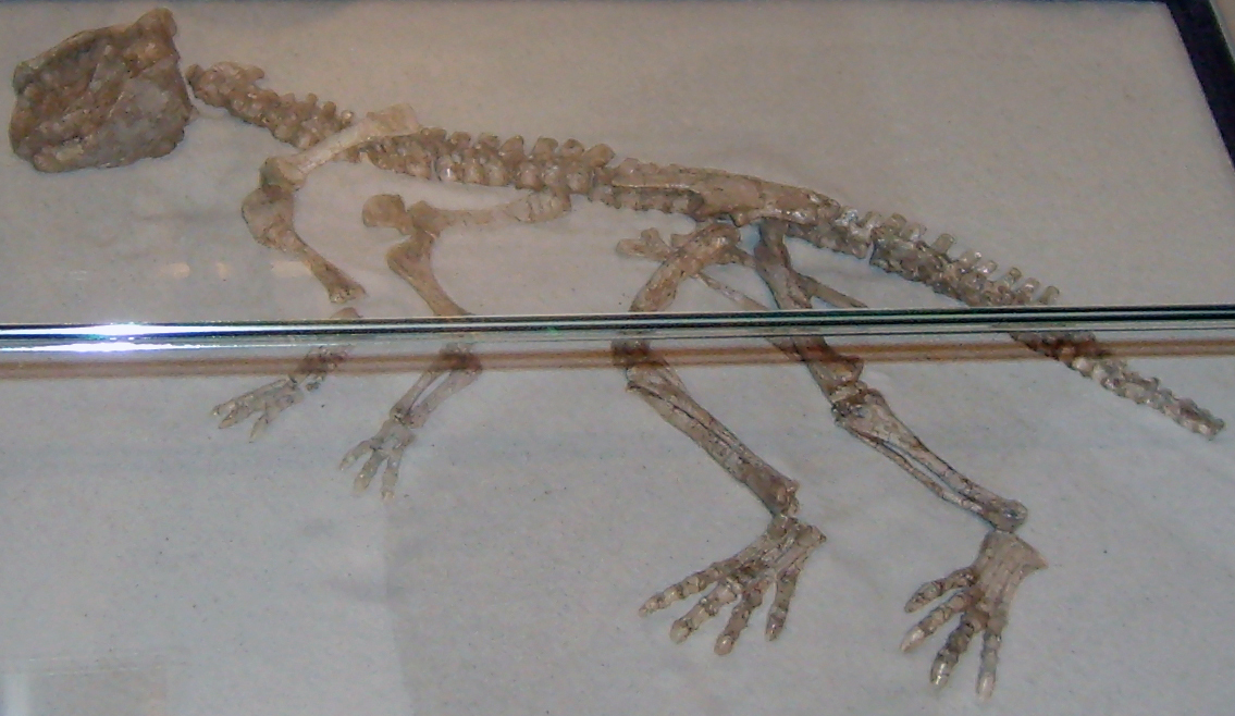 Psittacosaurus meileyingensis, Zoologisk Museum, Copenhagen.